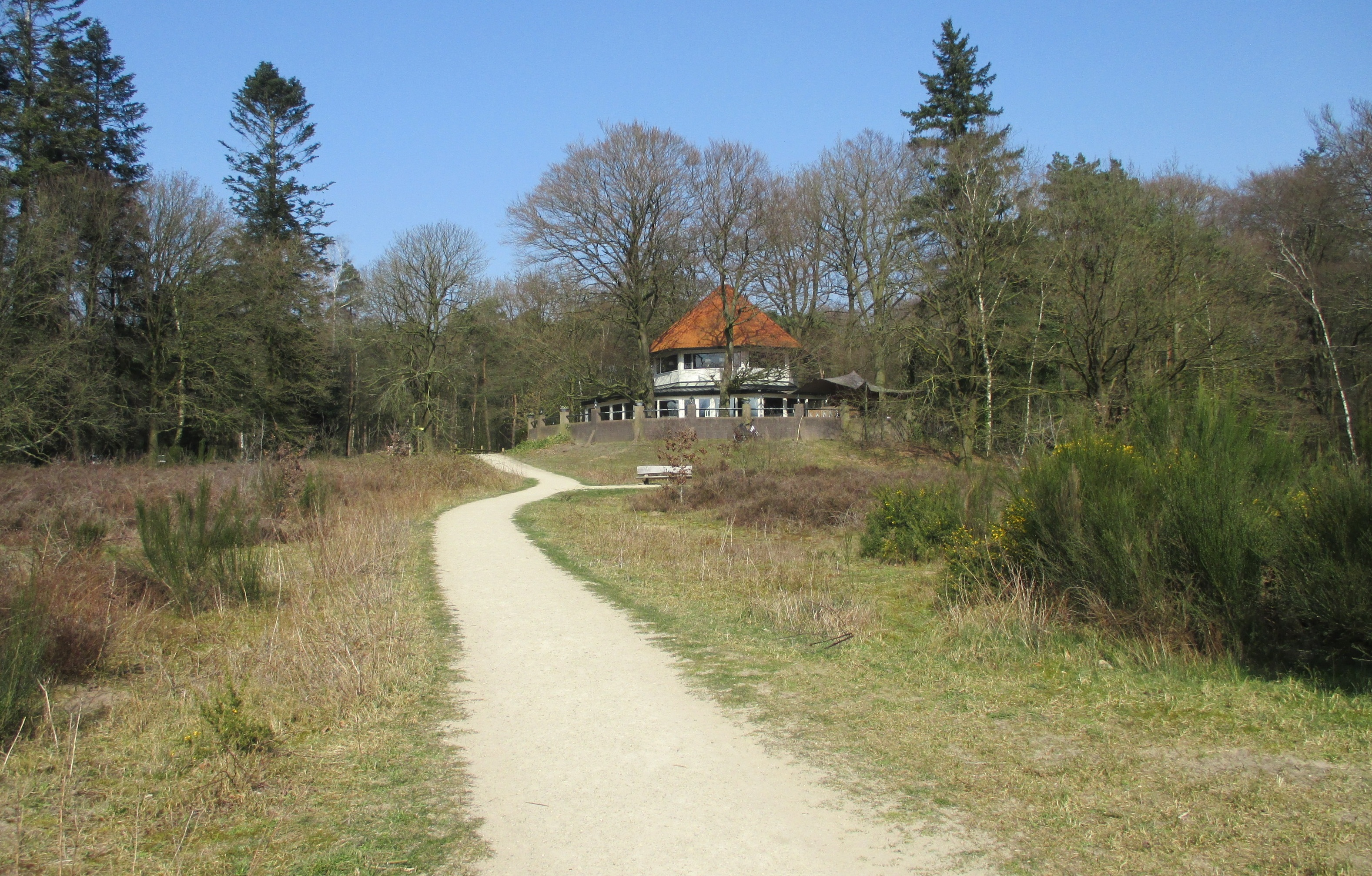 Helenaheuvel met het karakteristieke chalet St. Helena